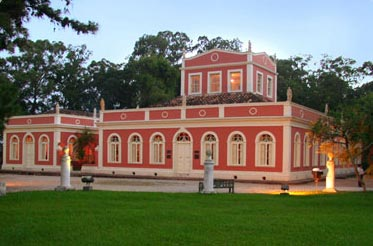 Museu Municipal Parque da Baronesa em Pelotas/Brasil